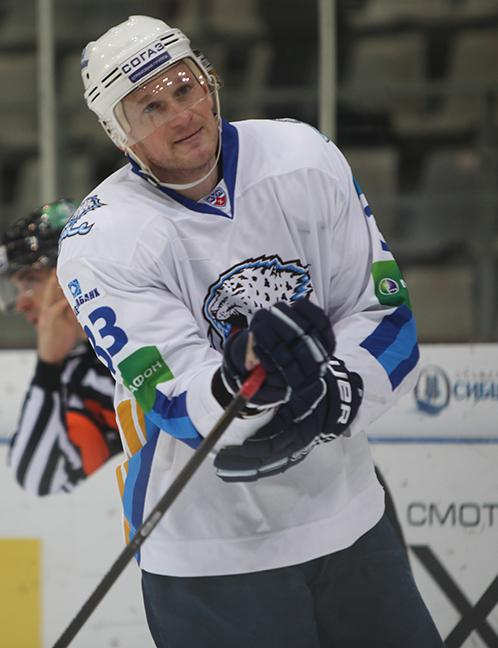 Нападающий астанинского «Барыса» Андрей Гаврилин во время матча чемпионата КХЛ против новокузнецкого «Металлурга» 7 января 2013 года.